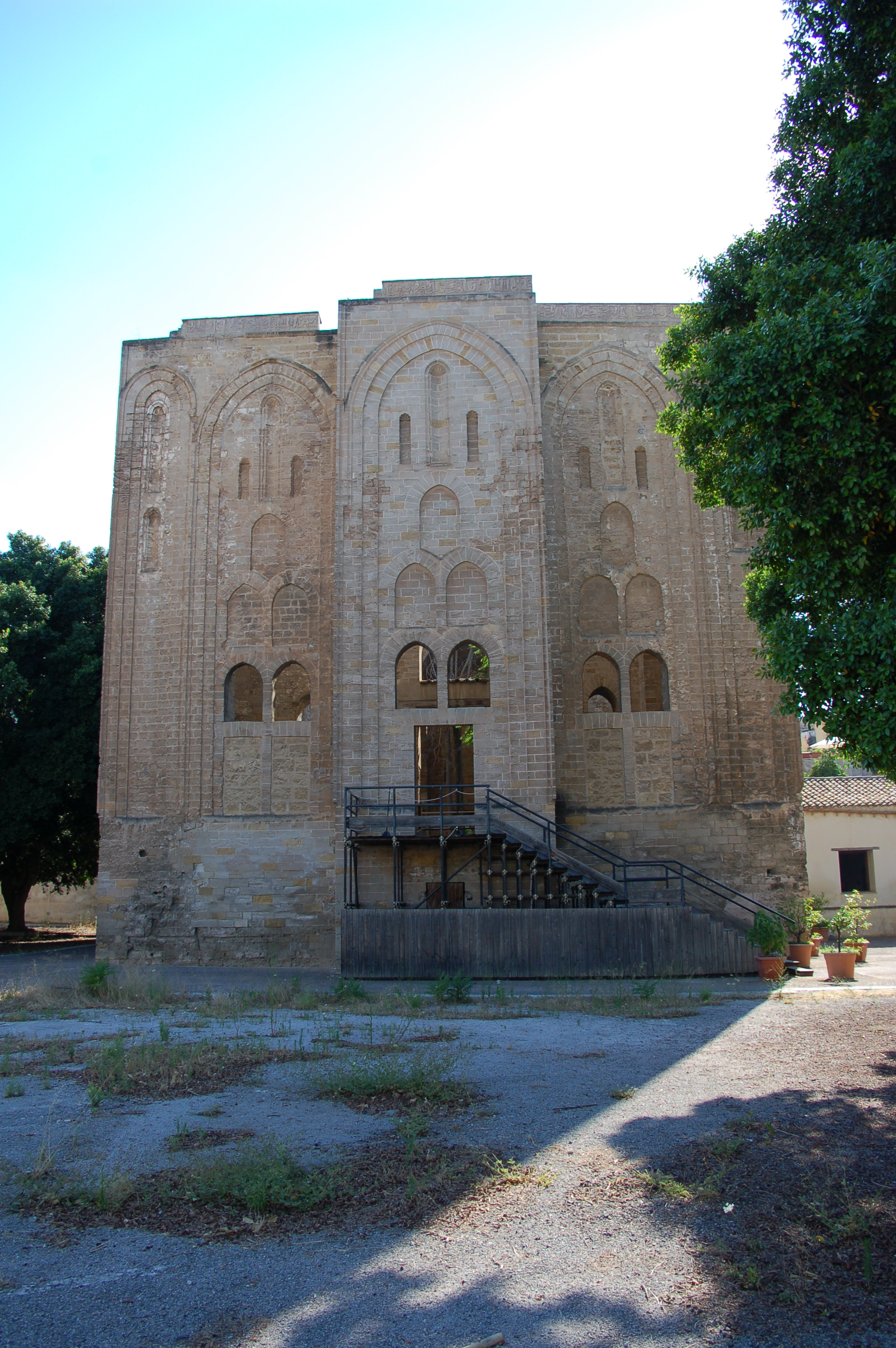 Cuba palace, Palermo Italy